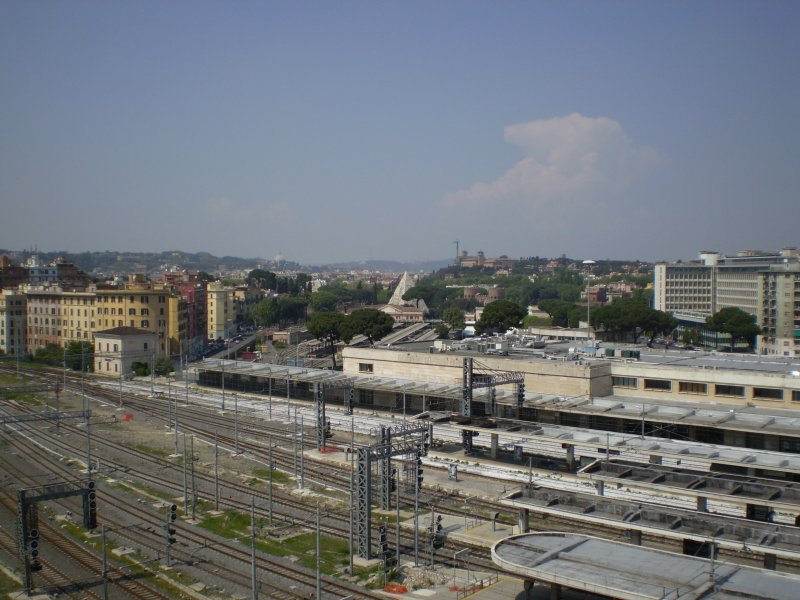 Vista della Stazione Ostiense